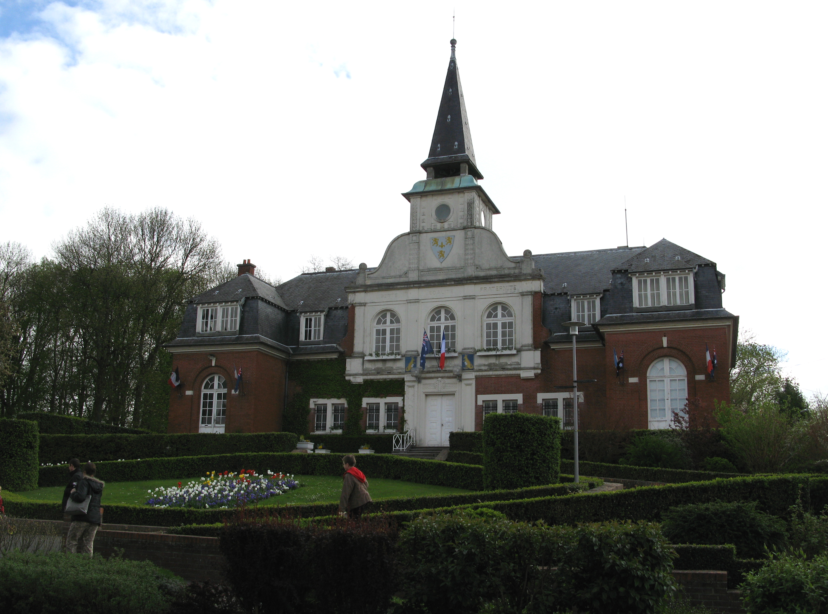 Villers-Bretonneux (Somme, France) - La mairie. . .